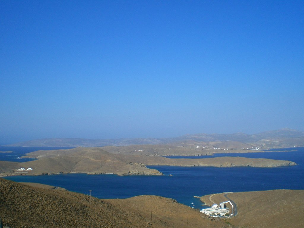 Titel: Blik op de smalle landtong die de Astypalea tot één eiland maakt Locatie: Astypalea, Griekenland Datum: september 2006 Fotograaf: Gebruiker:IMFJ